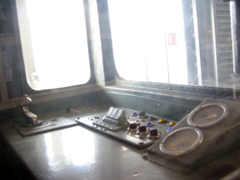 Poste de conduite d'un MP 51 Journées du patrimoine AMTUIR 15/09/2007.